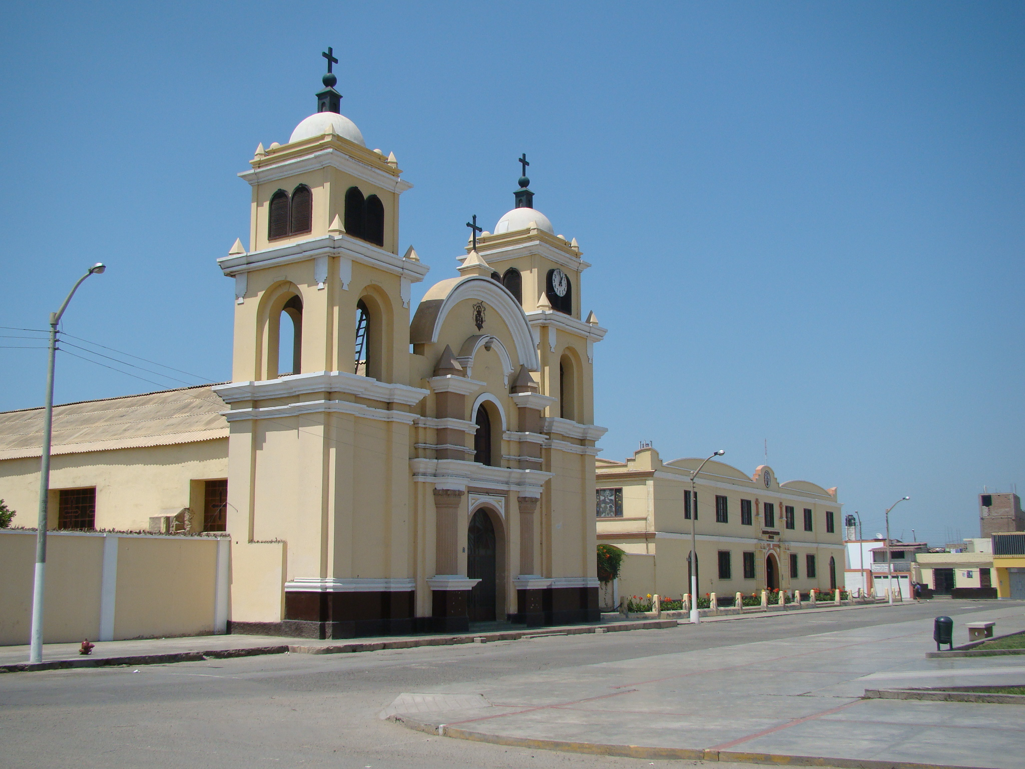 Toma de la fachada de la Iglesia San Pedro y San Pablo, y del Convento del los Padres Carmelitas Descalzos de Chocope